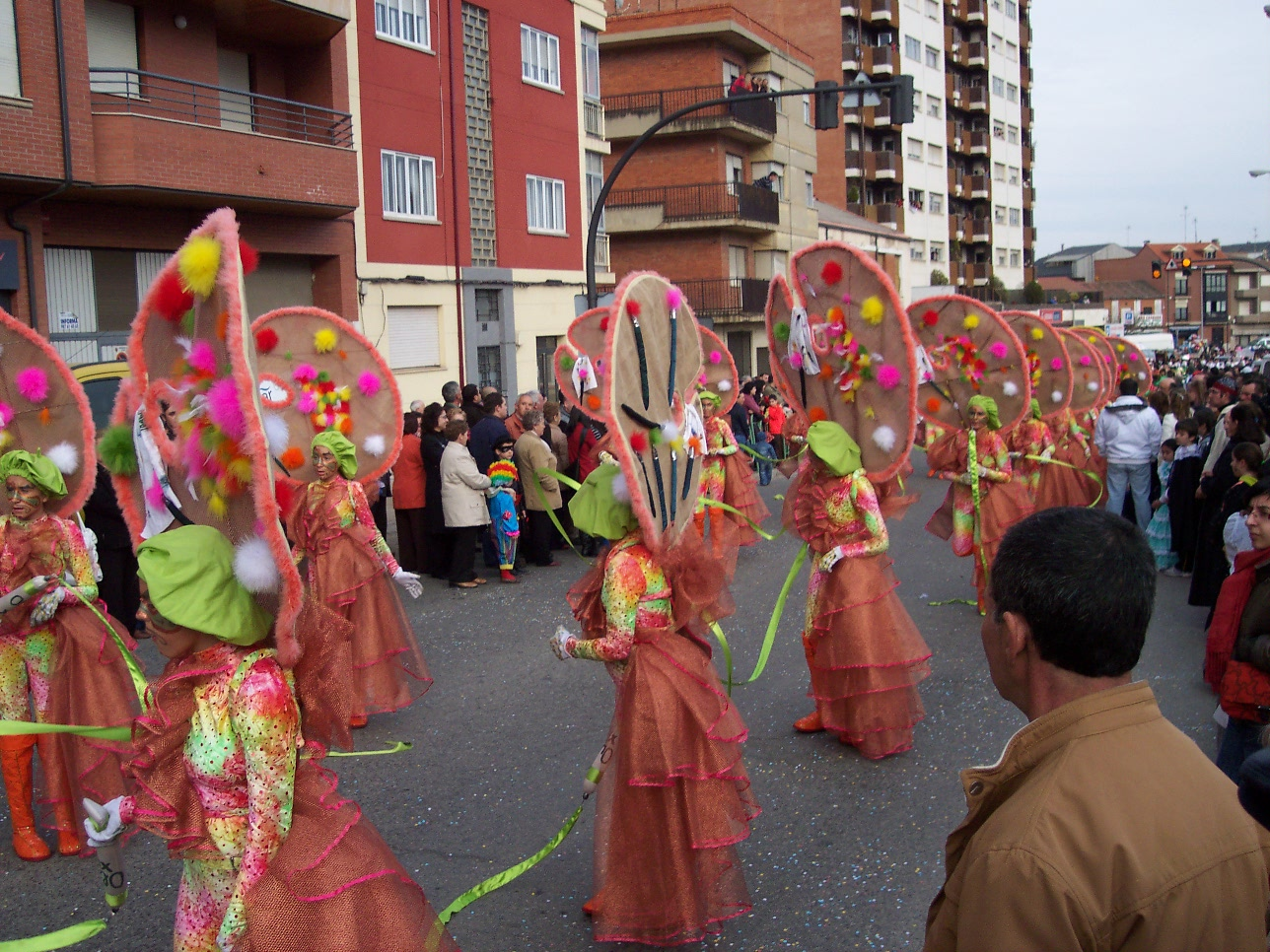 Desfile de carnaval 2009